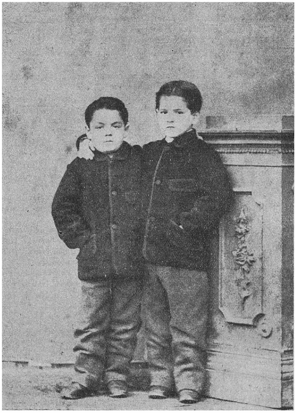 1866 - Take Ionescu şi fratele său Victor (România), la Constantinopol (Ottoman Empire)